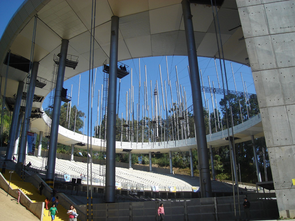 Fotos sacadas el fin de semana del 11 y 12 de Noviembre en Valparaíso y Viña del Mar, este incluyo: Visita a la sebastina (casa de pablo neruda), paseo 21 de Mayo, otro paseo con nombre rraro, ascensor el Peral y para finalizar una vuelta en bote por la Bahia de Valparaiso, muelle Vergara, Quinta Vergara y reloj de Flores. Artistas Invitados: Eduardo (yo), Felipe, Pauli, Marcia y Claudio. Eduardo Cortés Weblog